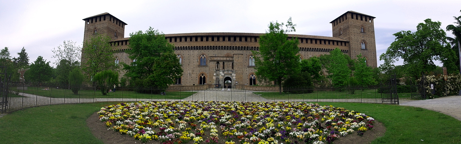 Pavia, Castello Visconteo